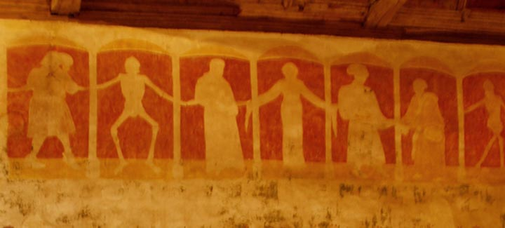 Chapelle Kermaria an Iskuit, commune de Plouha, Côtes-d'Armor (22), France. Fresque de la Danse macabre